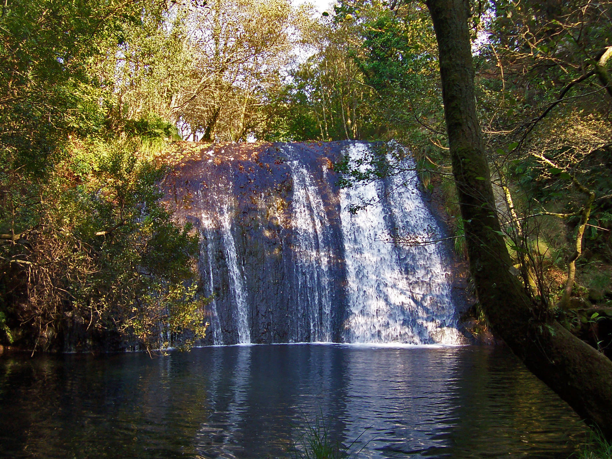 Fervenza San Xusto de Toxos Outos, Lousame